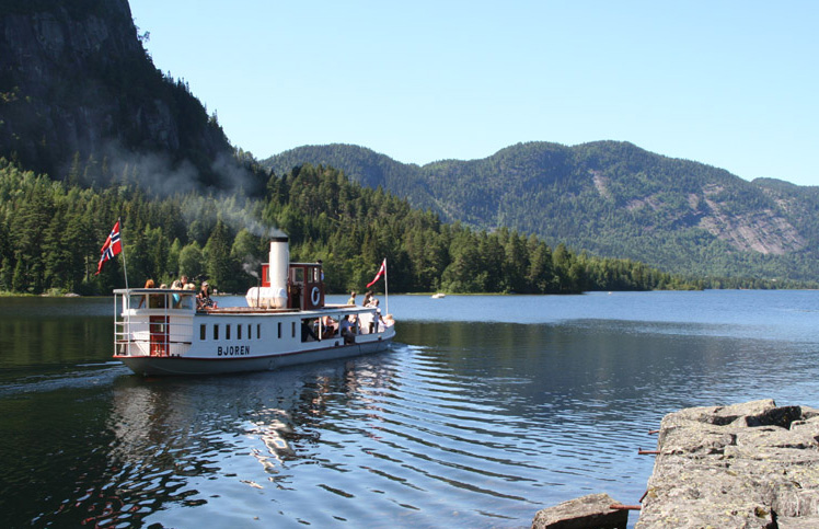 D/B «Bjoren» er en vedfyrt dampbåt som trafikkerer strekningen Byglandsfjord-Bygland og Bygland-Ose i Setesdal søndager i juli